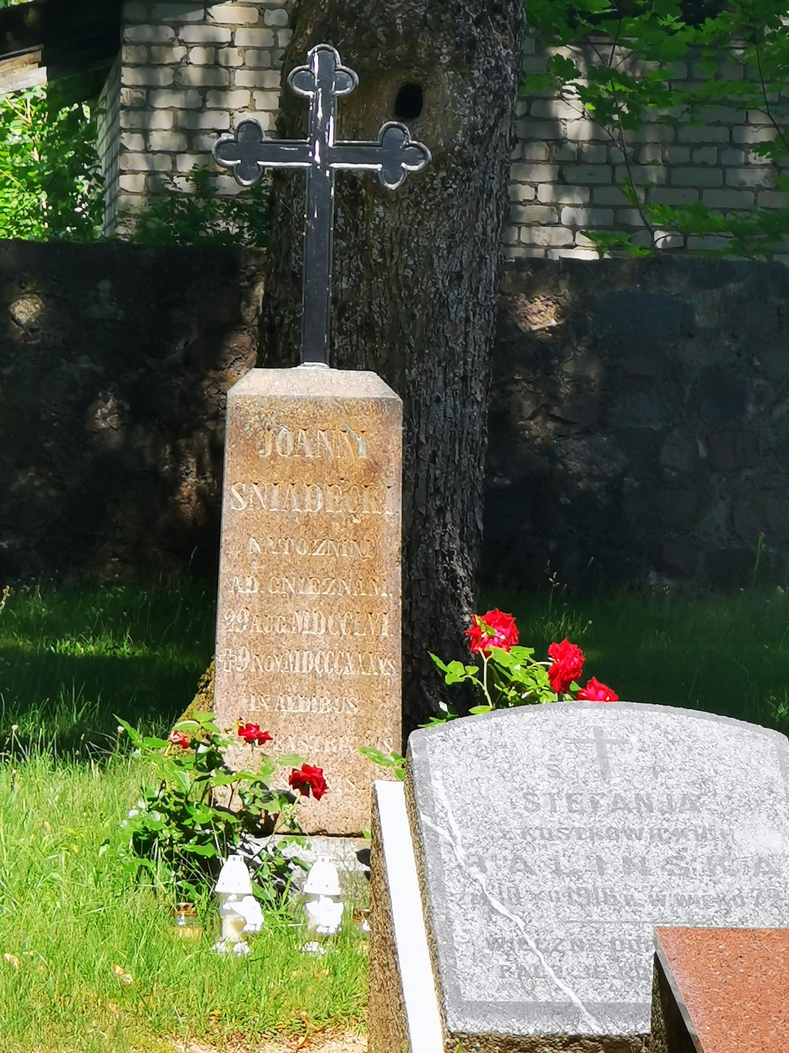 Sniadeckių ir Balinskių šeimų kapai Jašiūnuose. Centre Jono Sniadeckio kapas